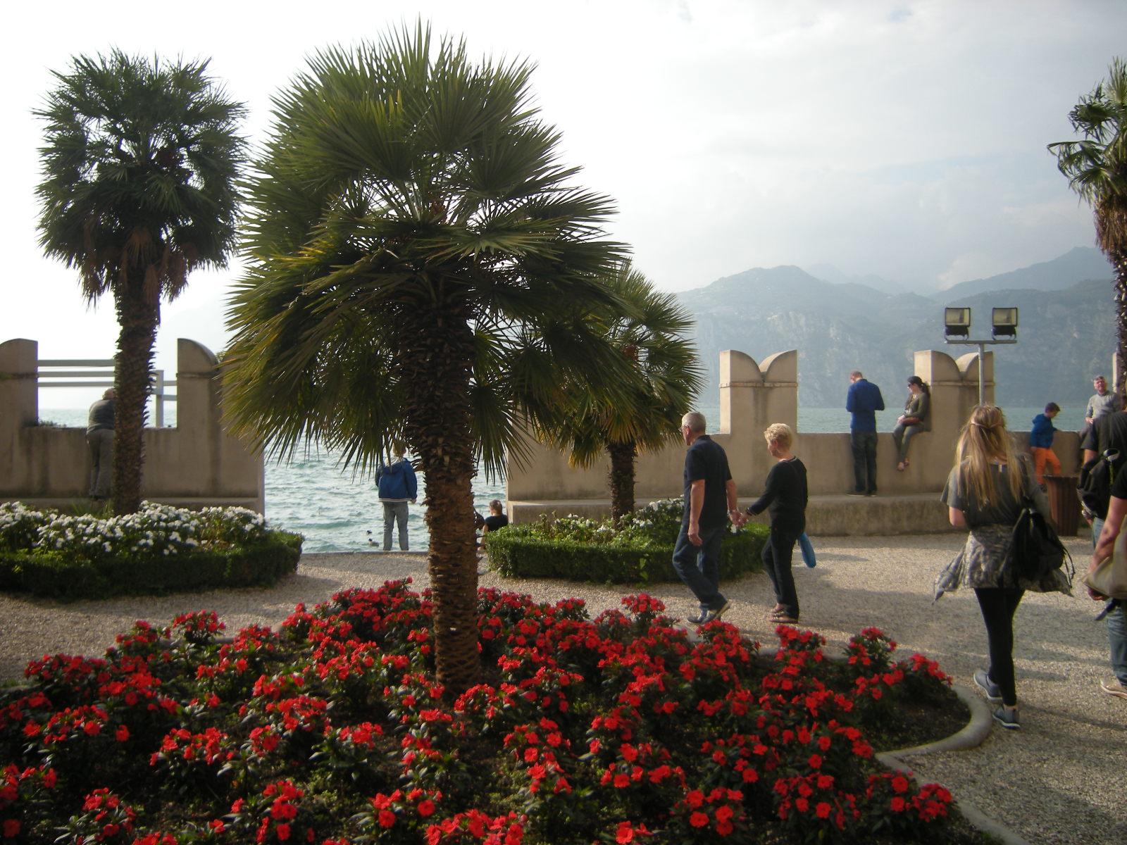 Malcesine: giardino del Palazzo dei Capitani